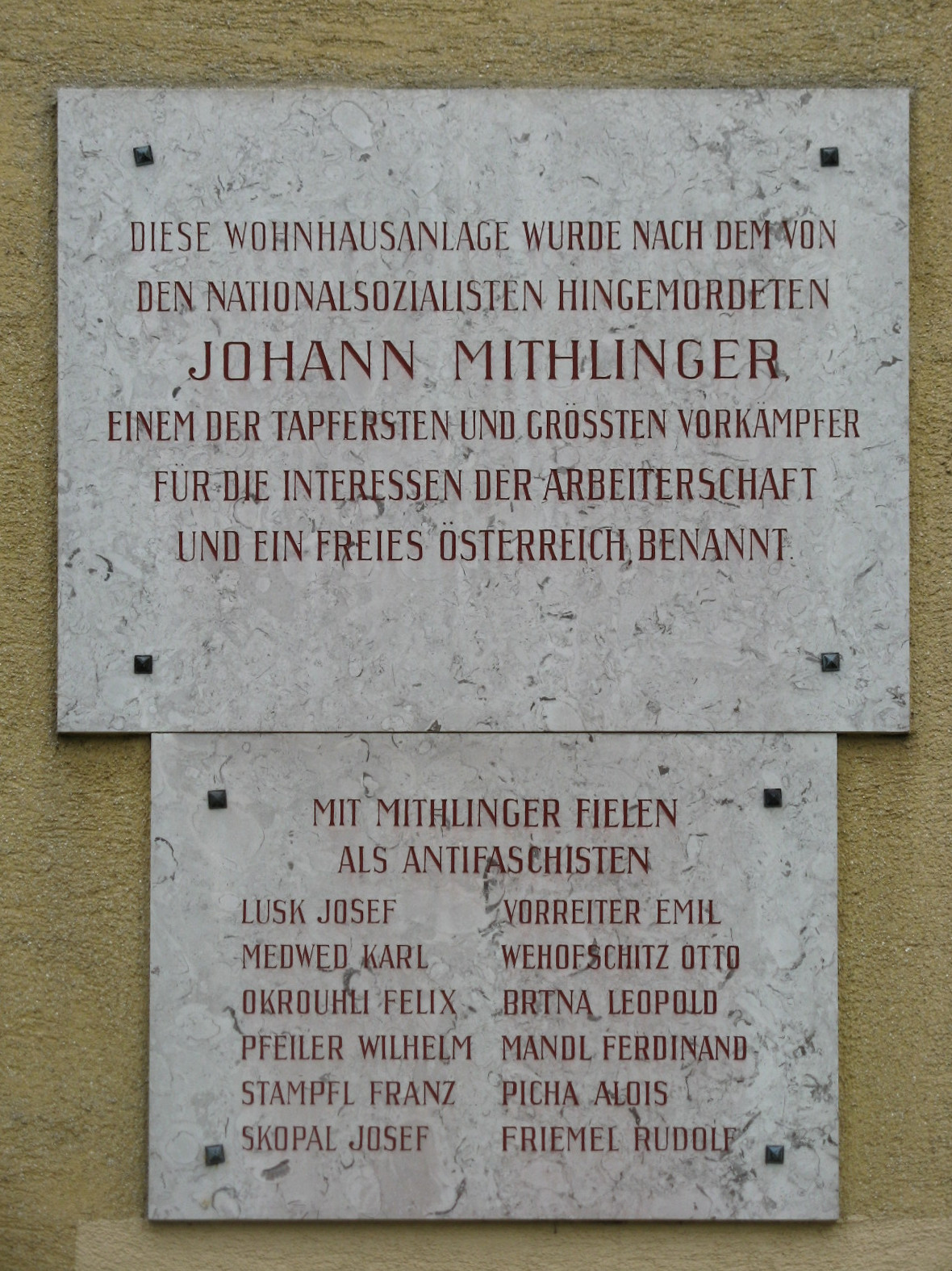 Gedenktafel für Johann Mithlinger, Johann-Mithlinger-Siedlung, Raxstraße 7-27, Wien-Favoriten